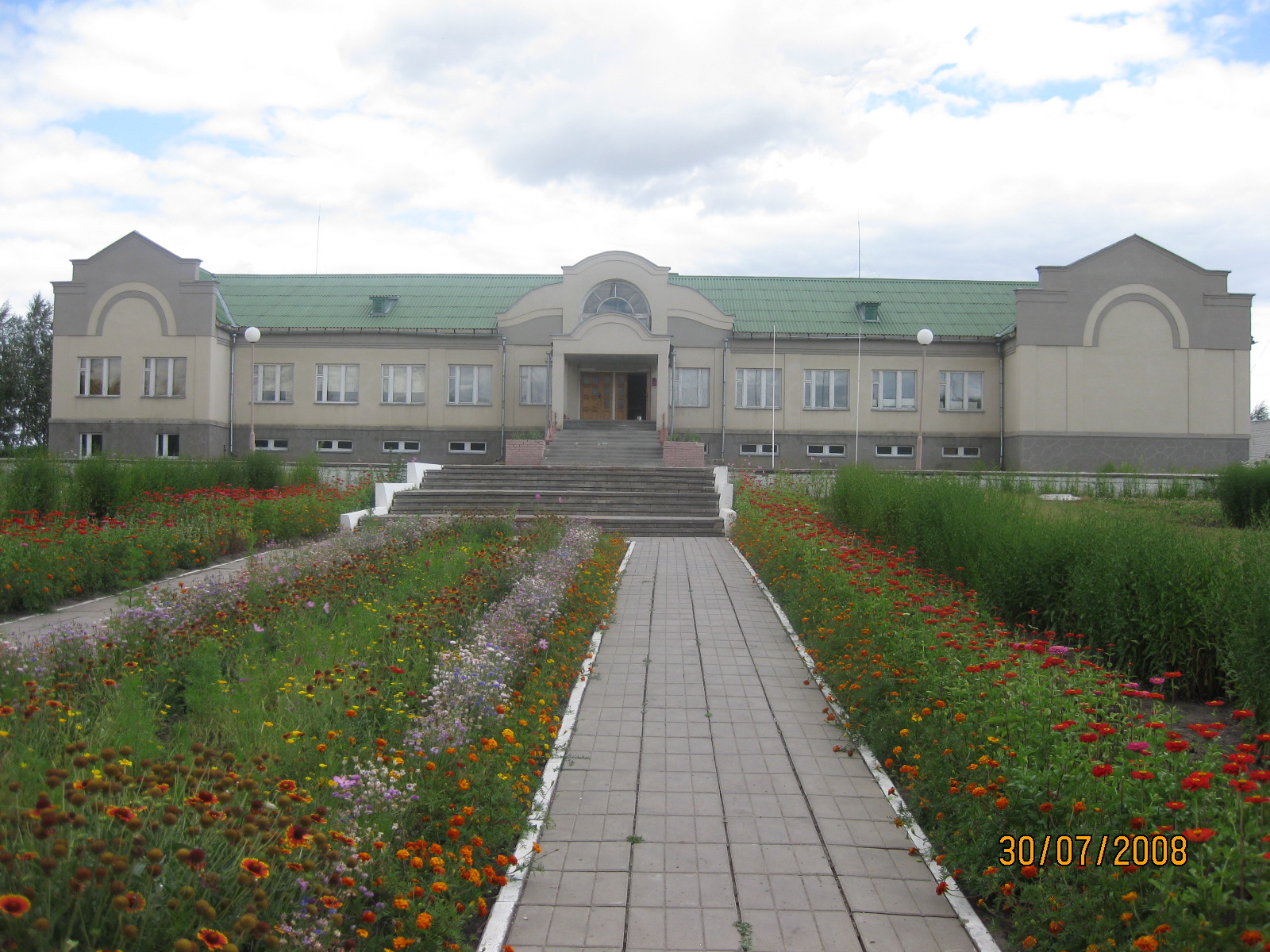 Средняя школа в с. Большое Красненского р-на Белгородской обл